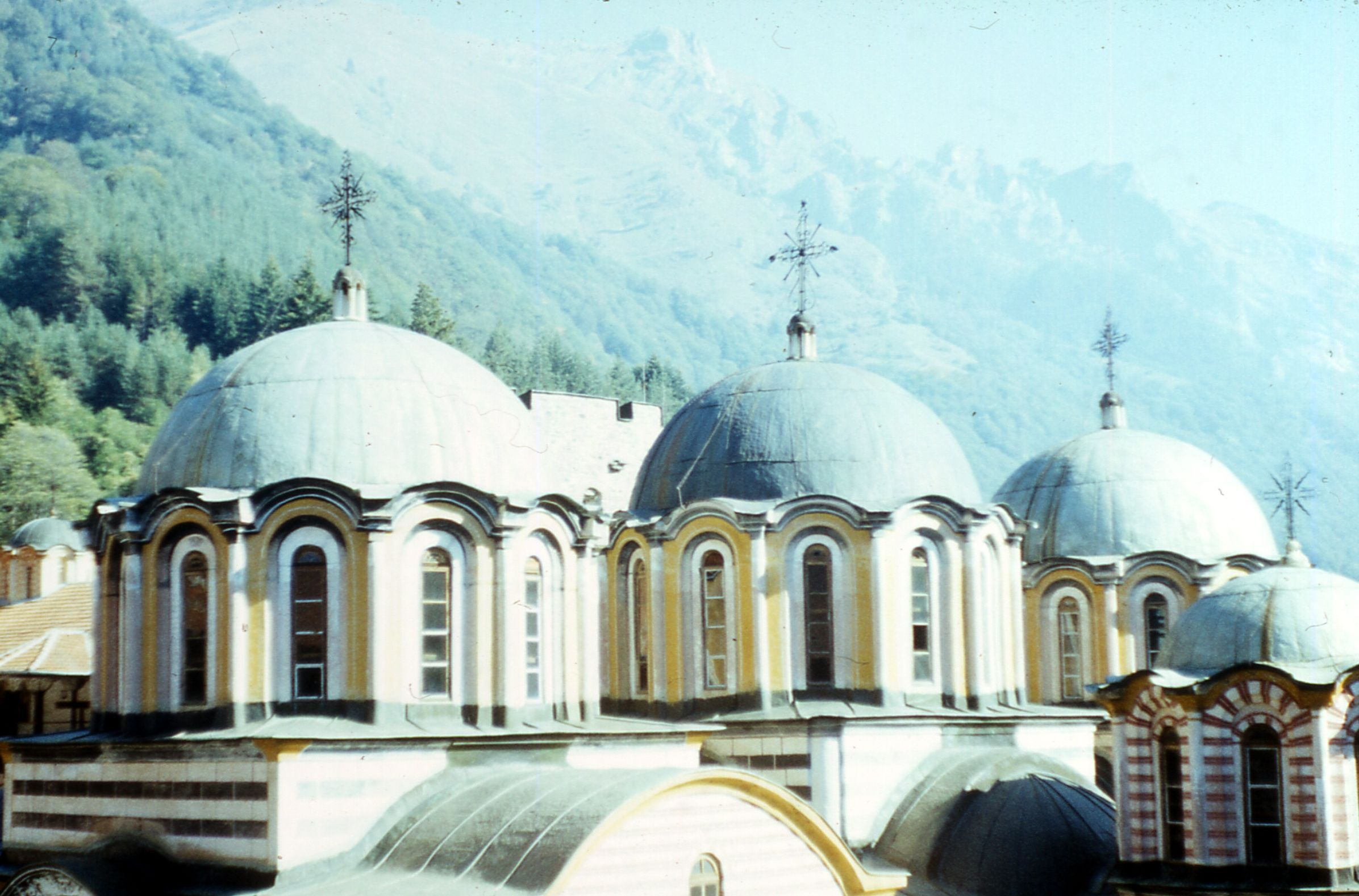 Rila 1985